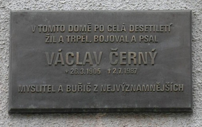 Praha, Bubeneč, Zelená 736/6 - pamětní deska Václava Černého na domě v Zelené ulici